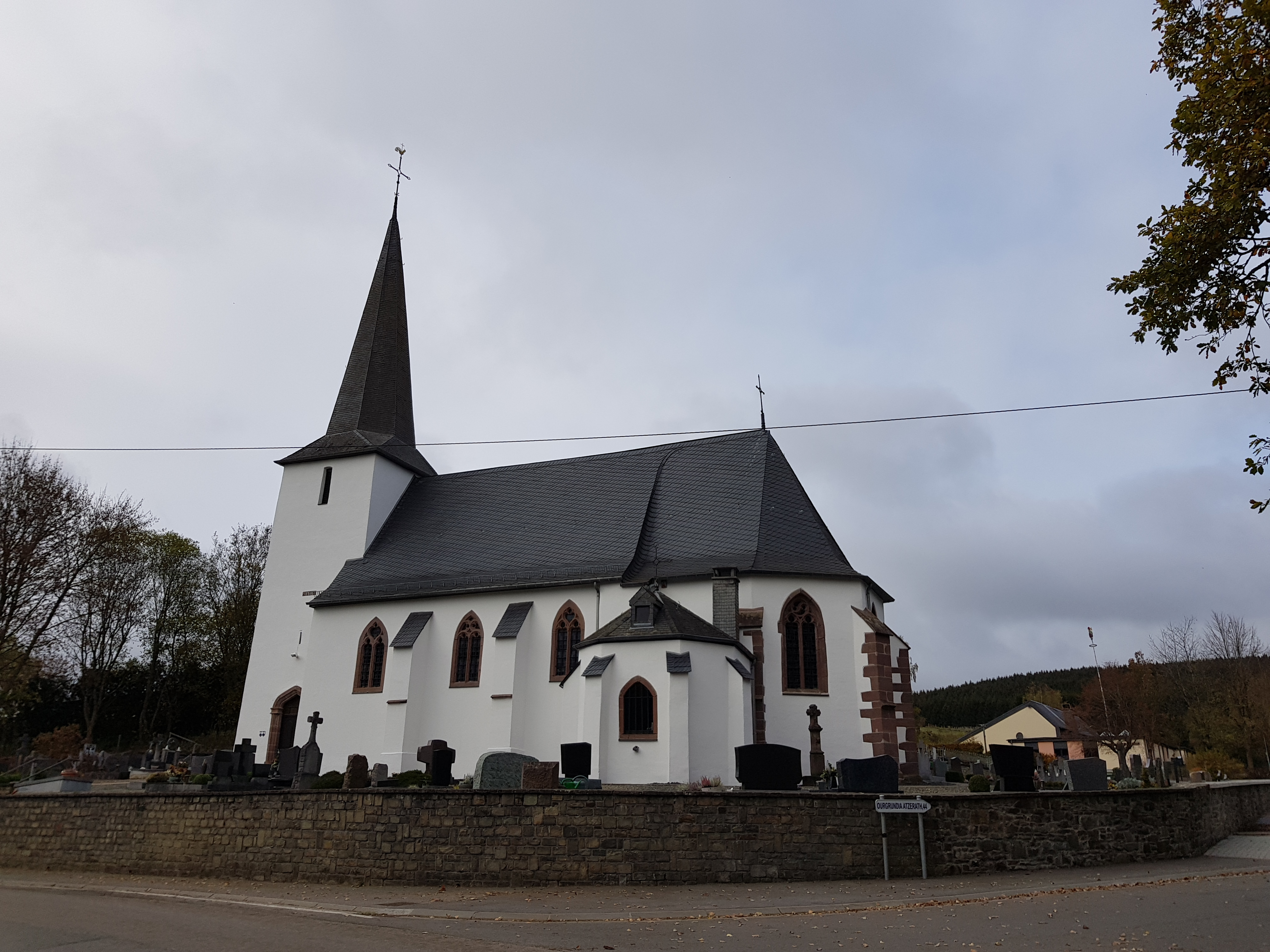 Kirche St. Laurentius, Mackenbach, Sankt Vith, Belgien This photo of immovable heritage has been taken in the Walloon Region